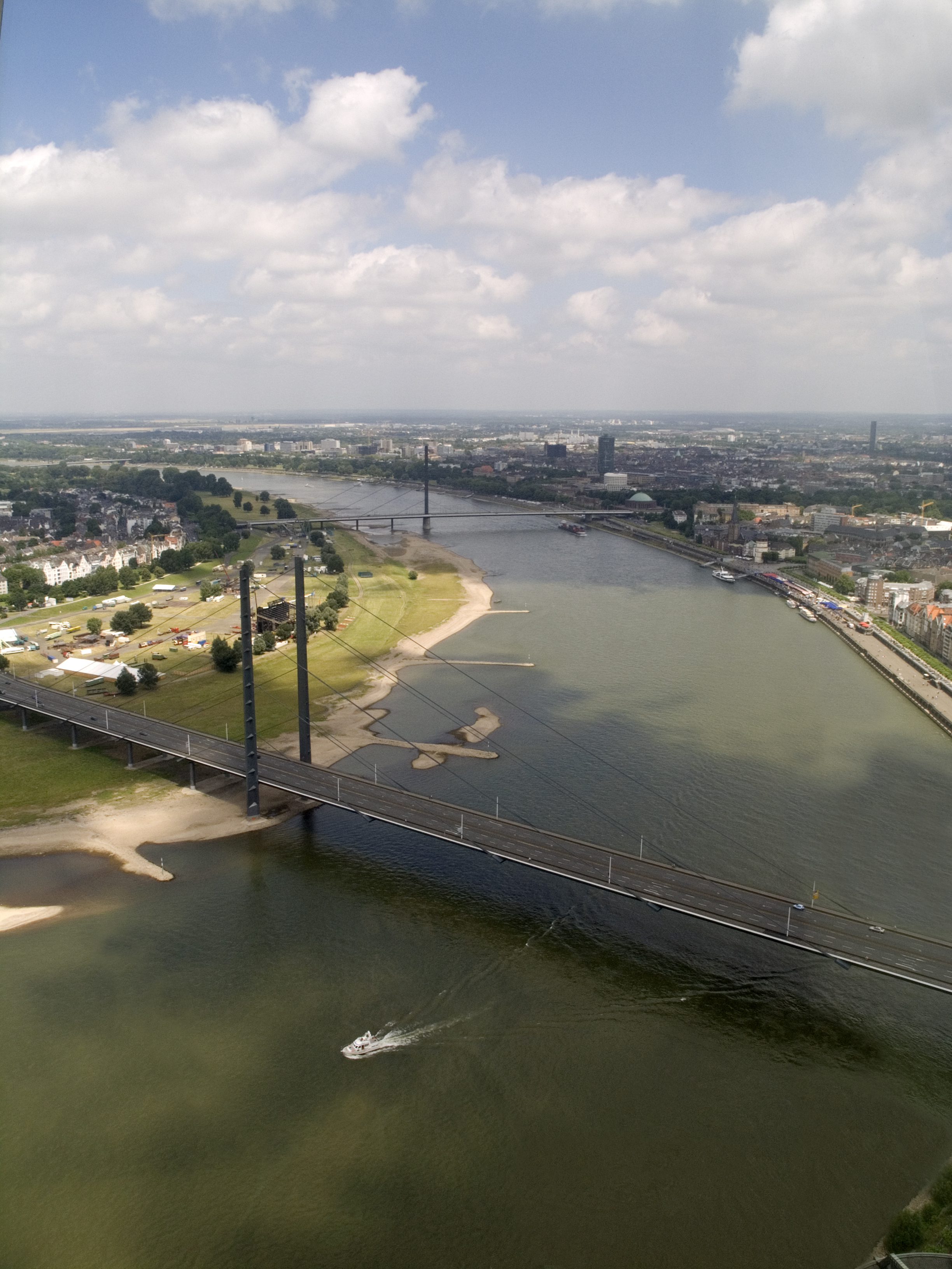 Северный Рейн-Вестфалия, Дюссельдорф - вид с башни Райнтурм на Рейн